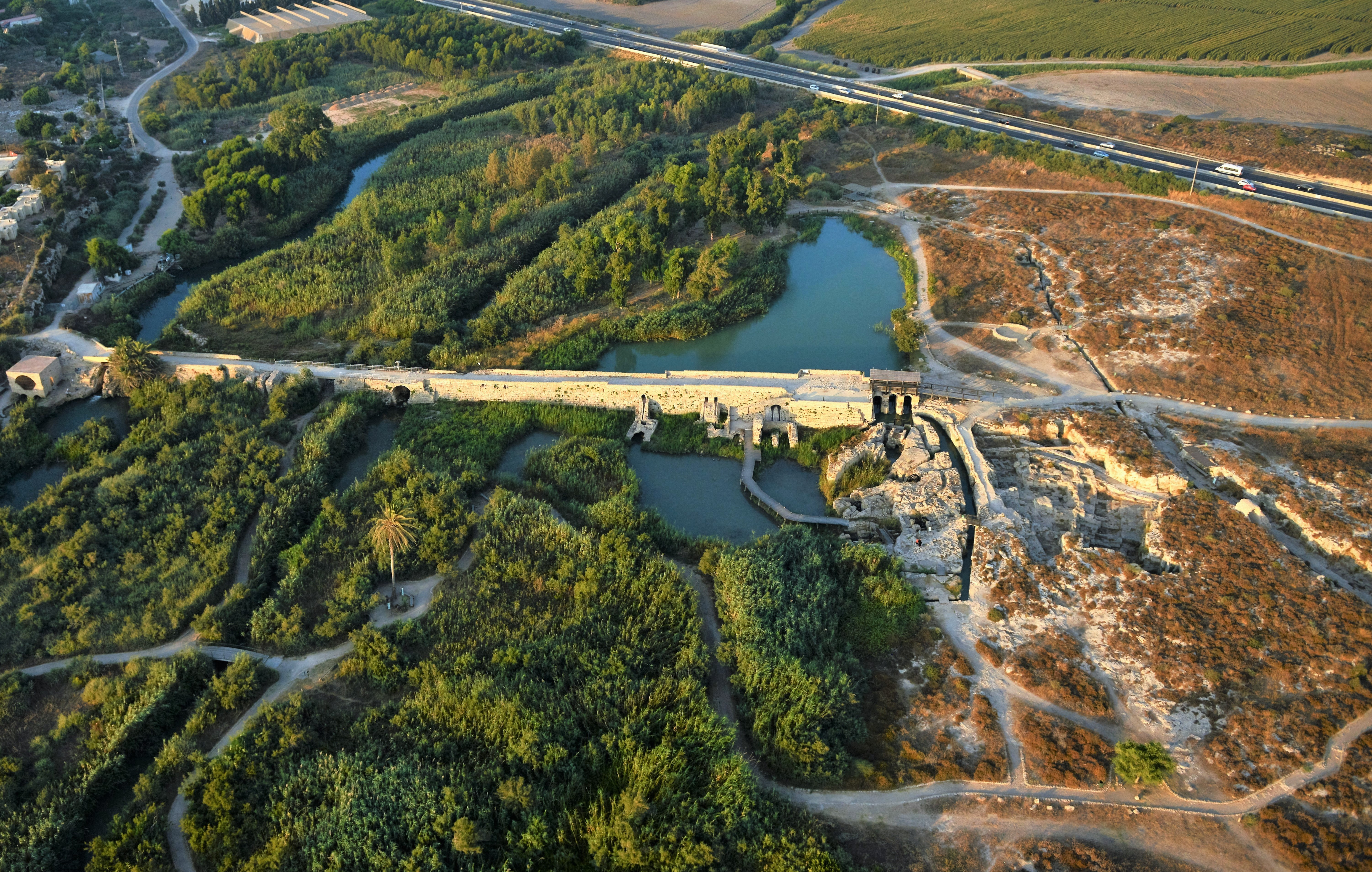 נחל תנינים (בערבית: وَادٍ الزرقاء - "ואדי ל-זֵרְקַא") הוא נחל איתן שתחילתו ברמות מנשה בין דליה לבין עין השופט. הנחל זורם דרום מערבה לים התיכון ונשפך לים דרומית לקיבוץ מעגן מיכאל. שם הנחל בערבית הוא נהר א-זרקא שפירושו הנחל הכחול. שמות נוספים קדומים לנחל הם נחל "תמאסיח" ו "וקרוקודילון".